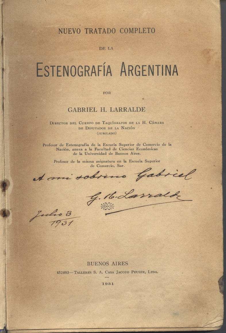 Libro escrito por Gabriel Hilario Larralde y dedicado de puño y letra a su sobrino Gabriel Angel Larralde